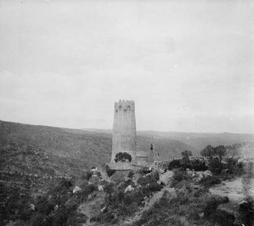 Imatge